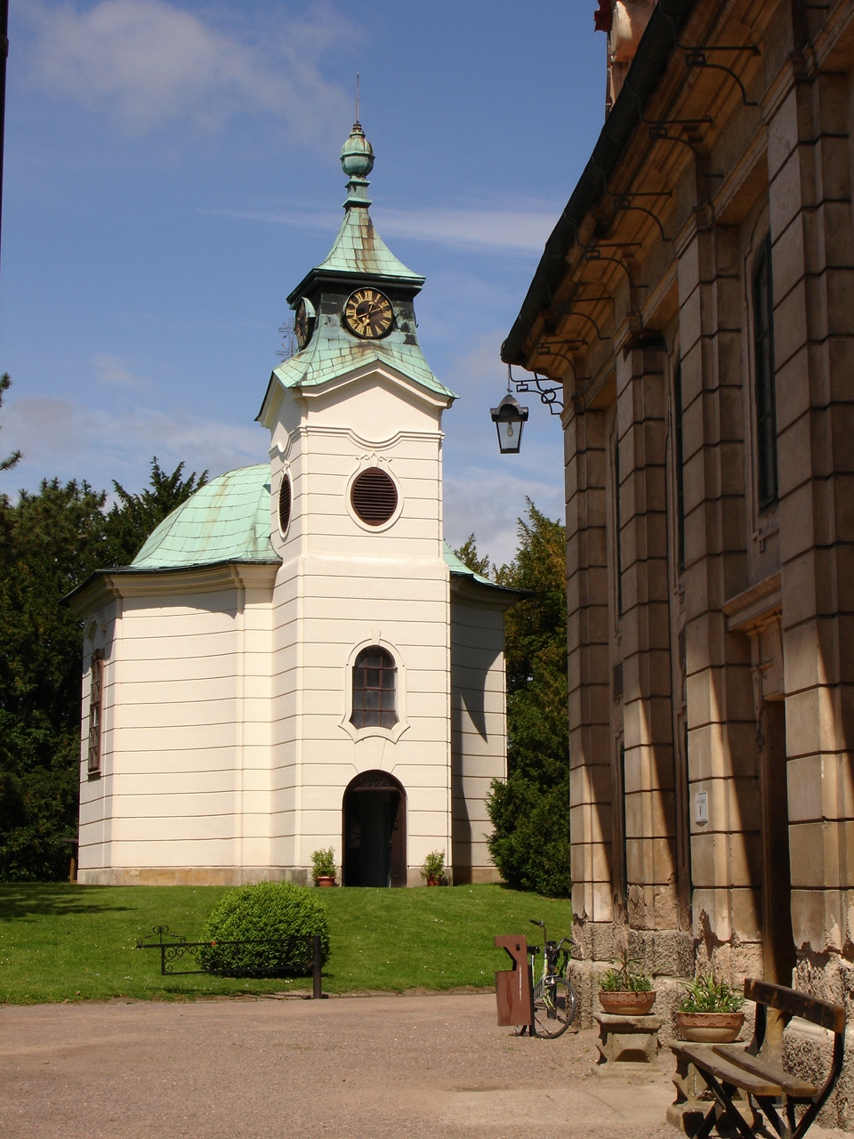 Zámecká kaple Panny Marie Sedmibolestné při zámku Karlova Koruna v Chlumci nad Cidlinou.